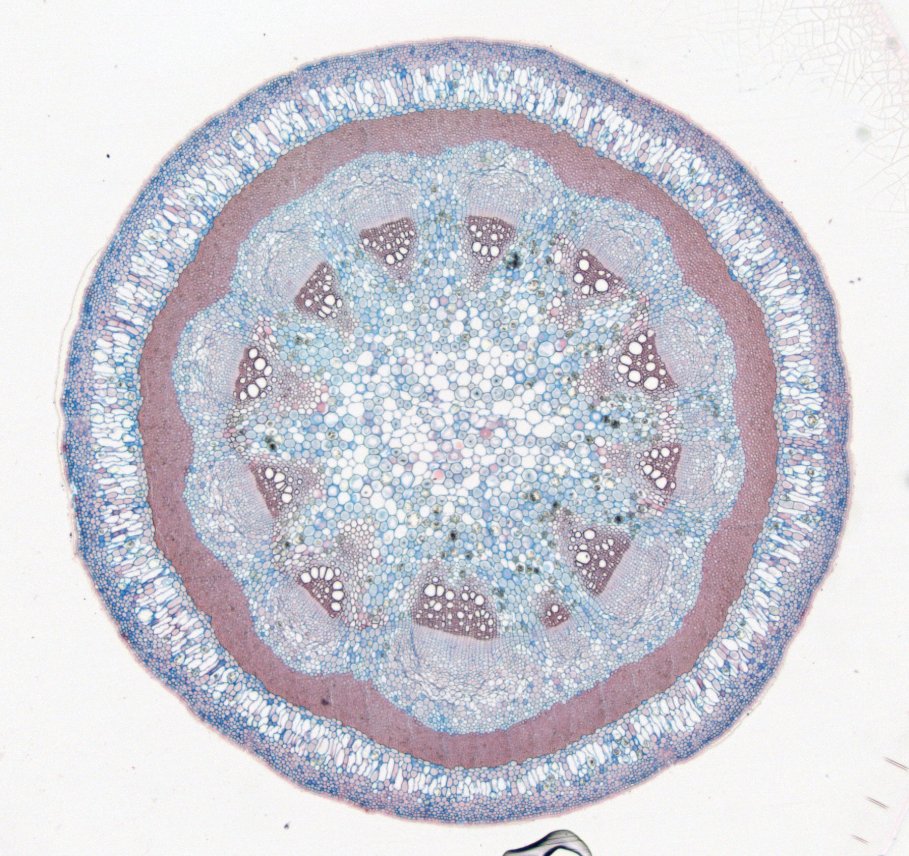 Querschnitt durch einen einjährigen Spross von Aristolochia macrophylla (Pfeifenwinde). Zu sehen ist der primäre Entwicklungszustand des Sprosses. Dauerpräparat Kunststoffschnitt (Glycolmethacrylat), Färbung mit Safranin und Astralblau. Zur Bezeichnung einzelner Gewebe den Mauszeiger über das Bild bewegen (Notizfunktion).